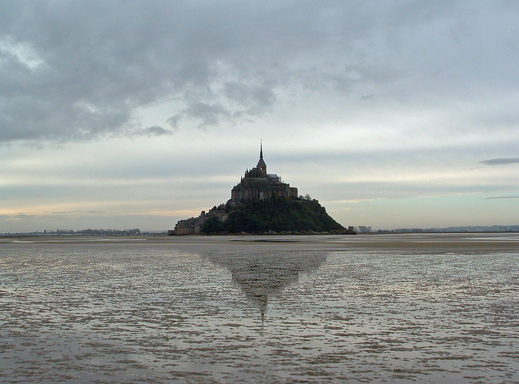 L'abbaye du Mont St Michel vue depuis la baie à marée basse